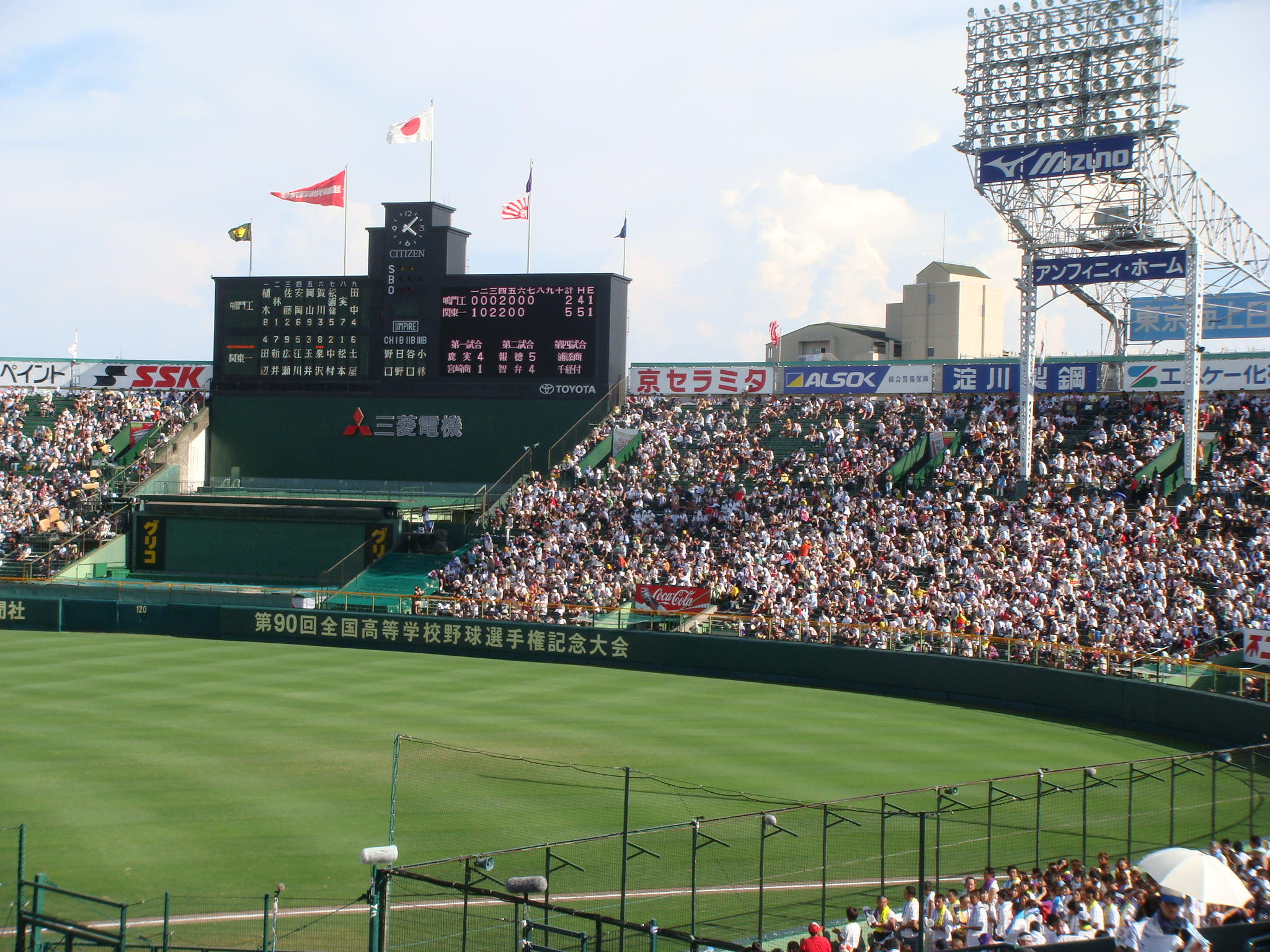 Koshien Stadium